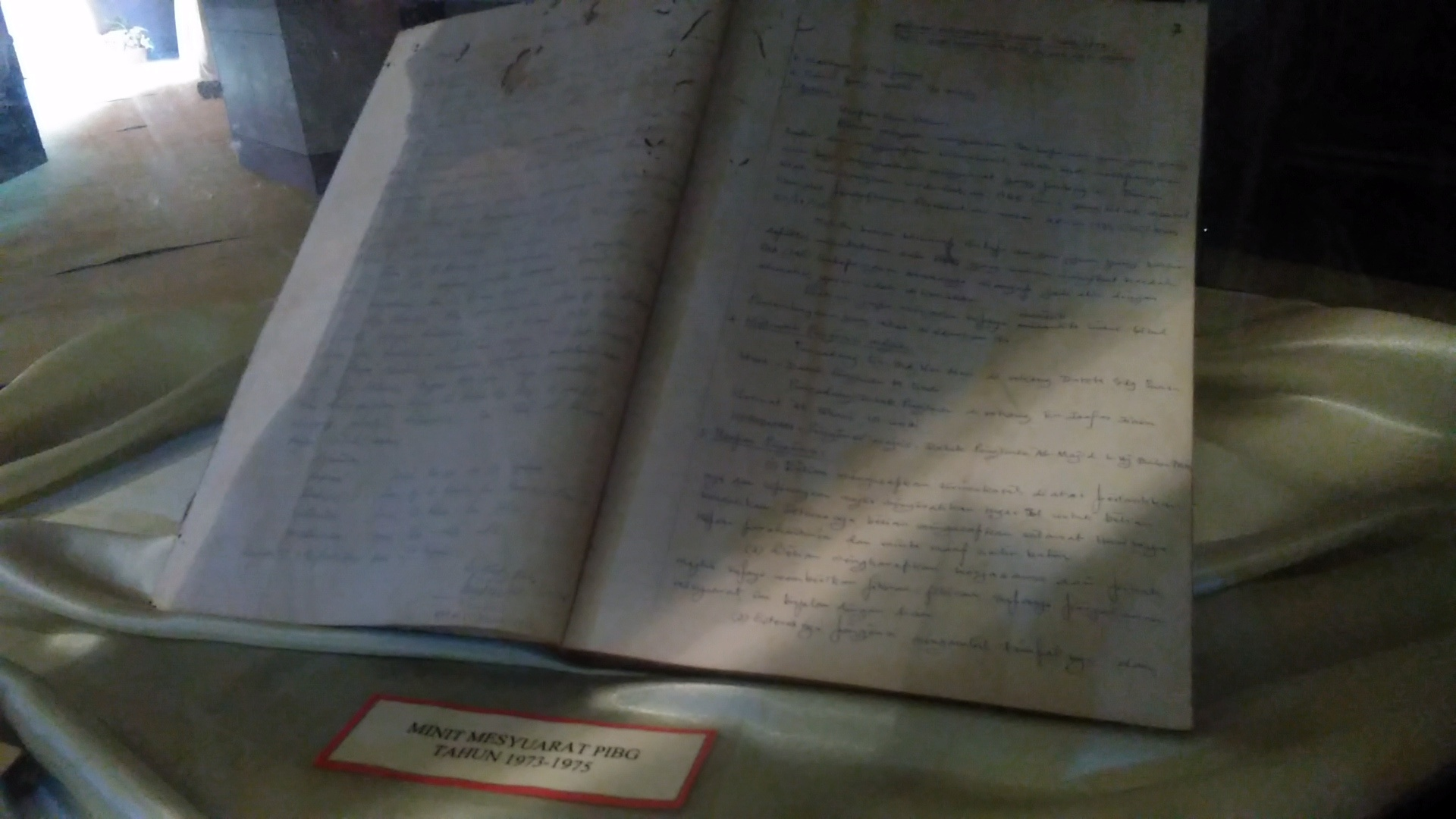 Buku Minit Mesyuarat PIBG Tahun 1973-1975